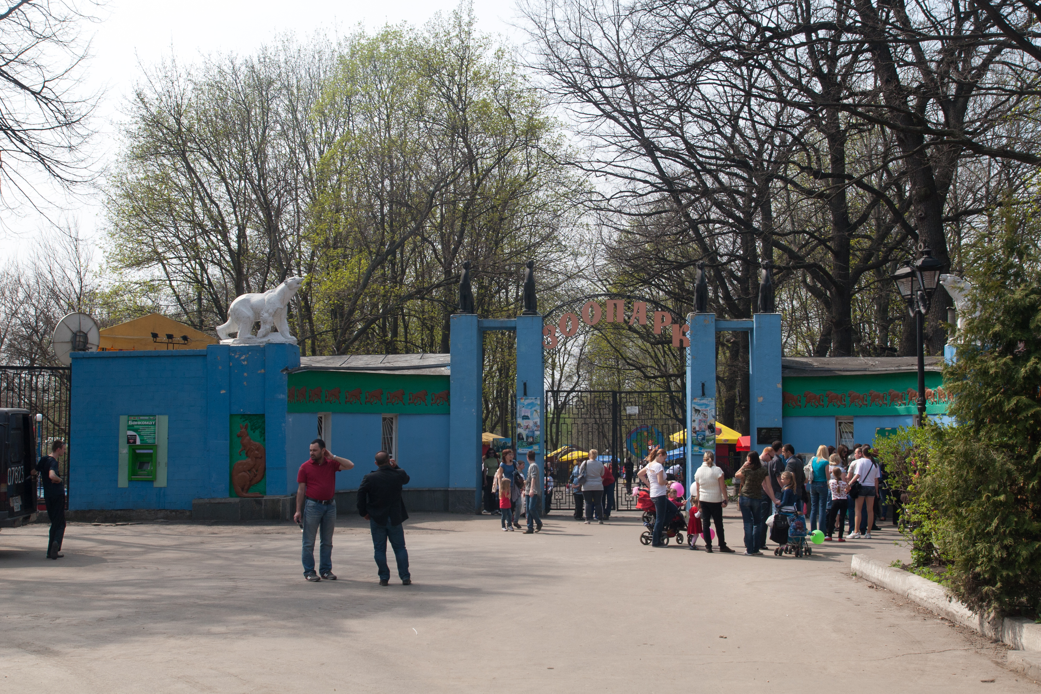 Харківський зоопарк